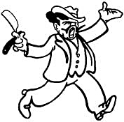 Caricatura da personagem cômica Juó Bananère desenhada por Voltolino.